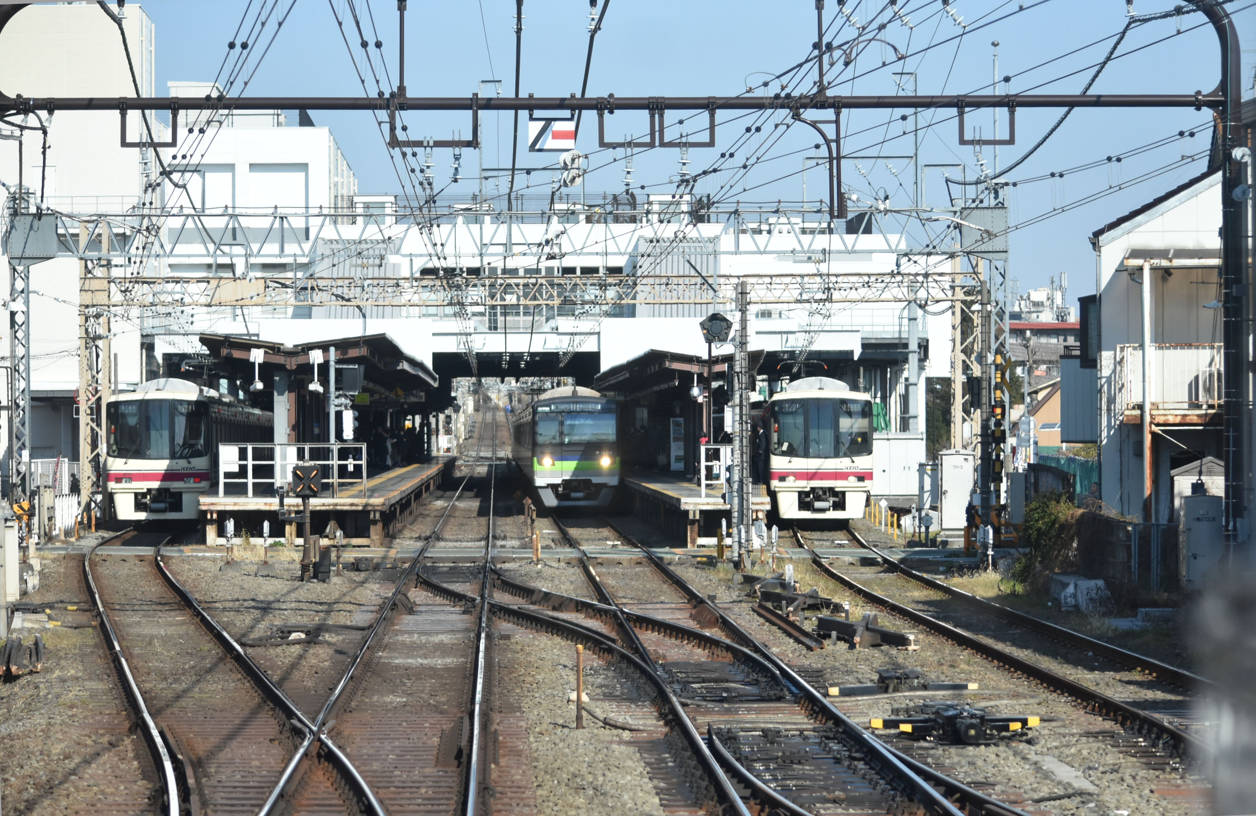 京王線 つつじヶ丘駅 Nikon D3400